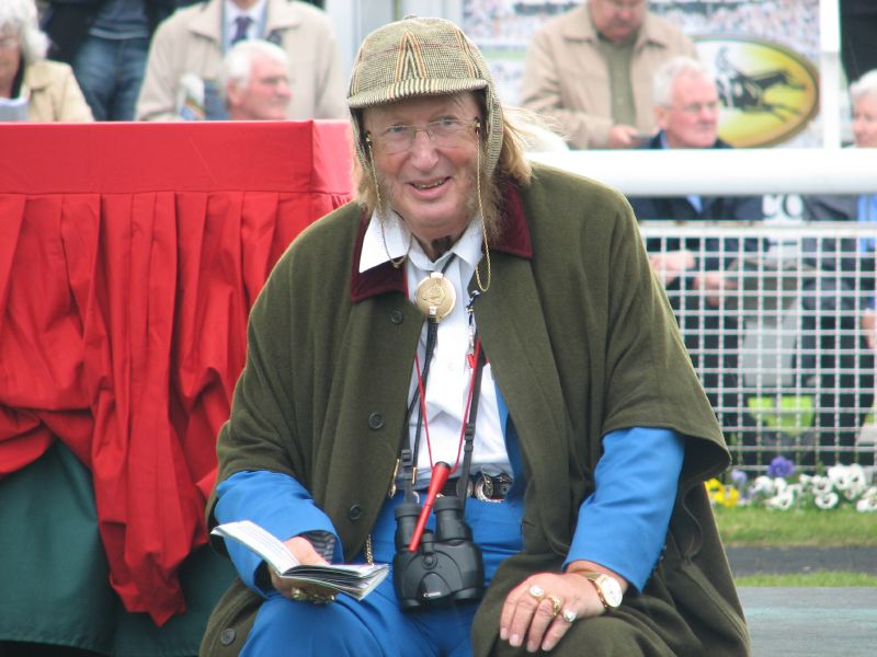 John McCririck